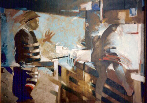 Bez tytułu,olej na płótnie 90x100,1988,Ewa Śliwa-Owczarek. Pomnik Aleksandra Świętochowskiego.